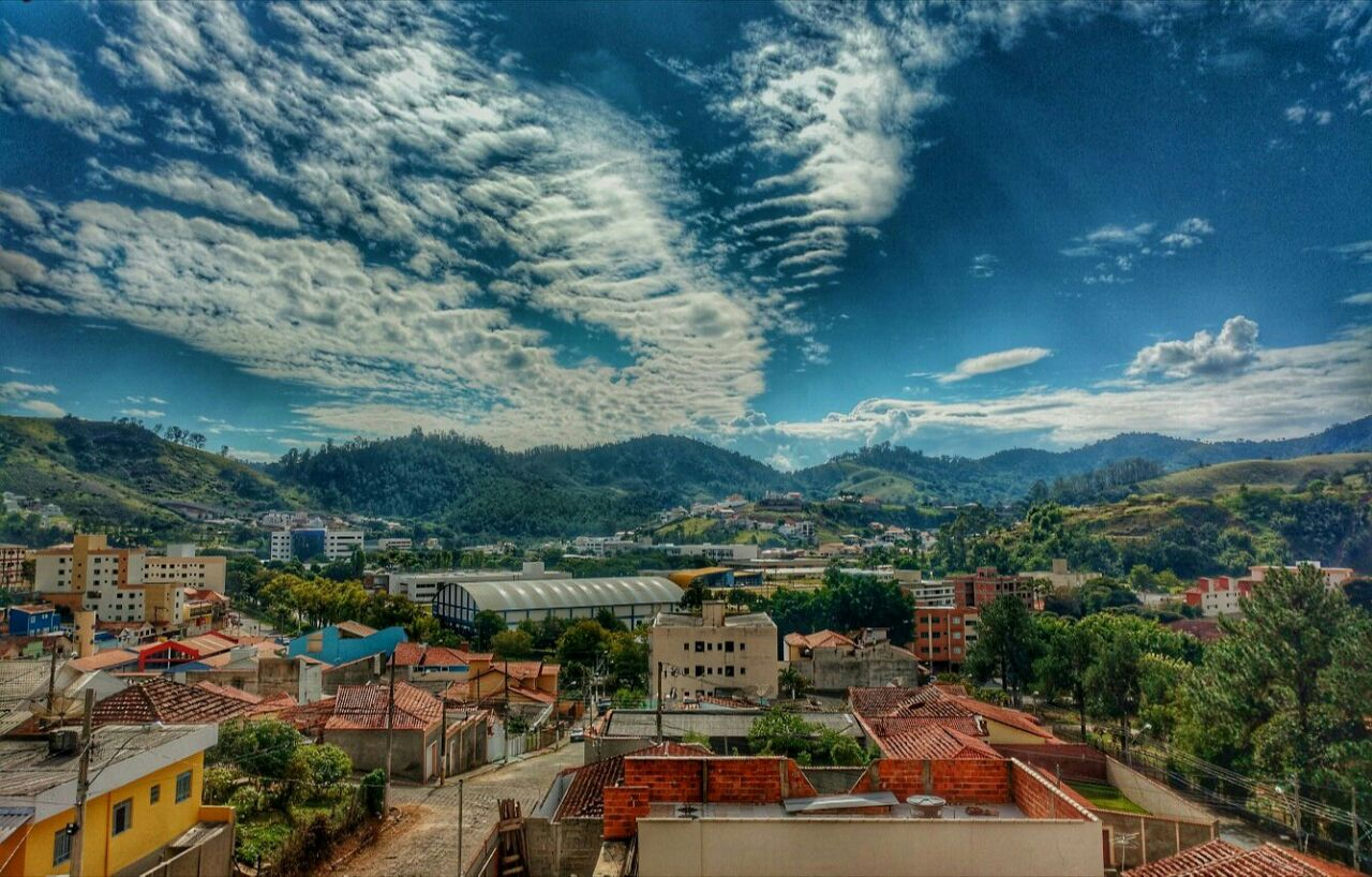 Bairro próximo à Universidade Federal de Itajubá.